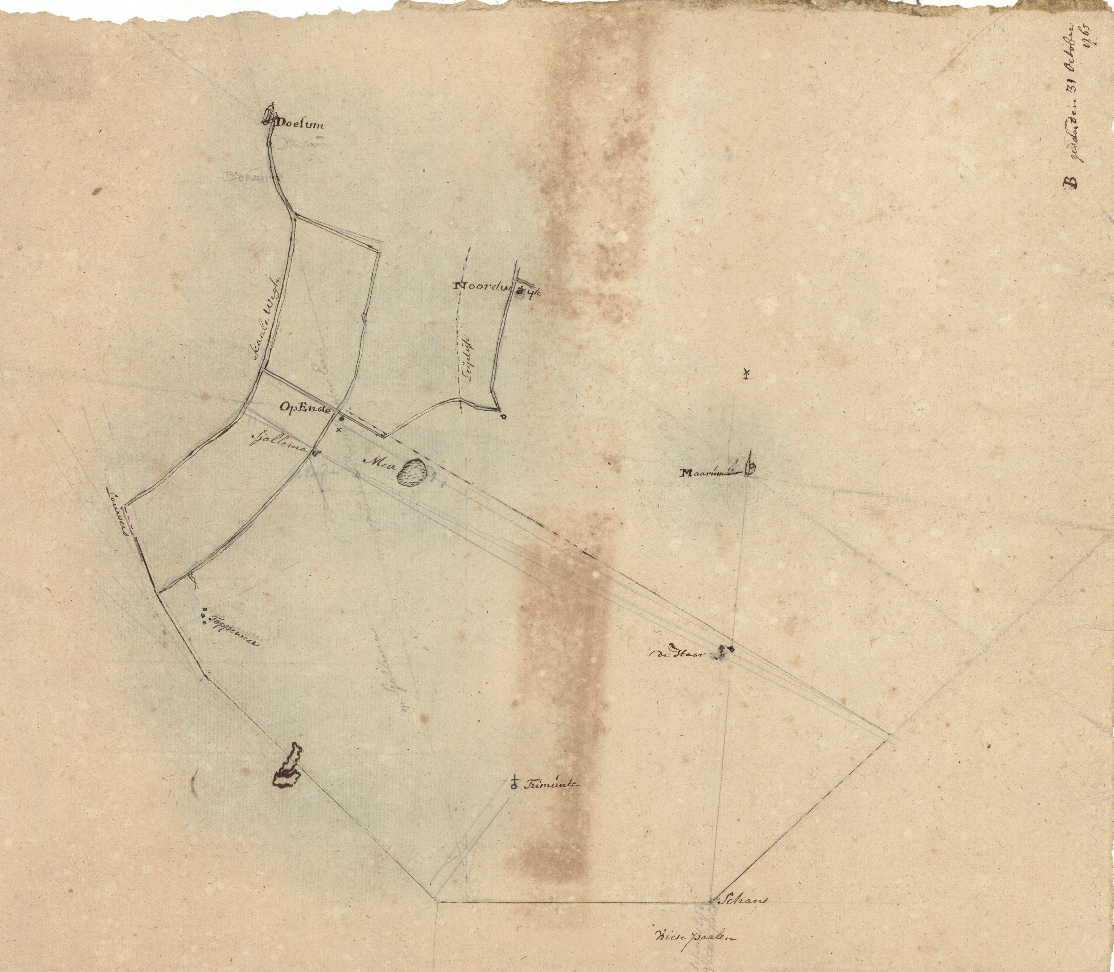 Schetskaart van het westelijk gedeelte van het Westerkwartier : omgeving Opende. Rechtsboven: B gedaan den 31 october 1765.